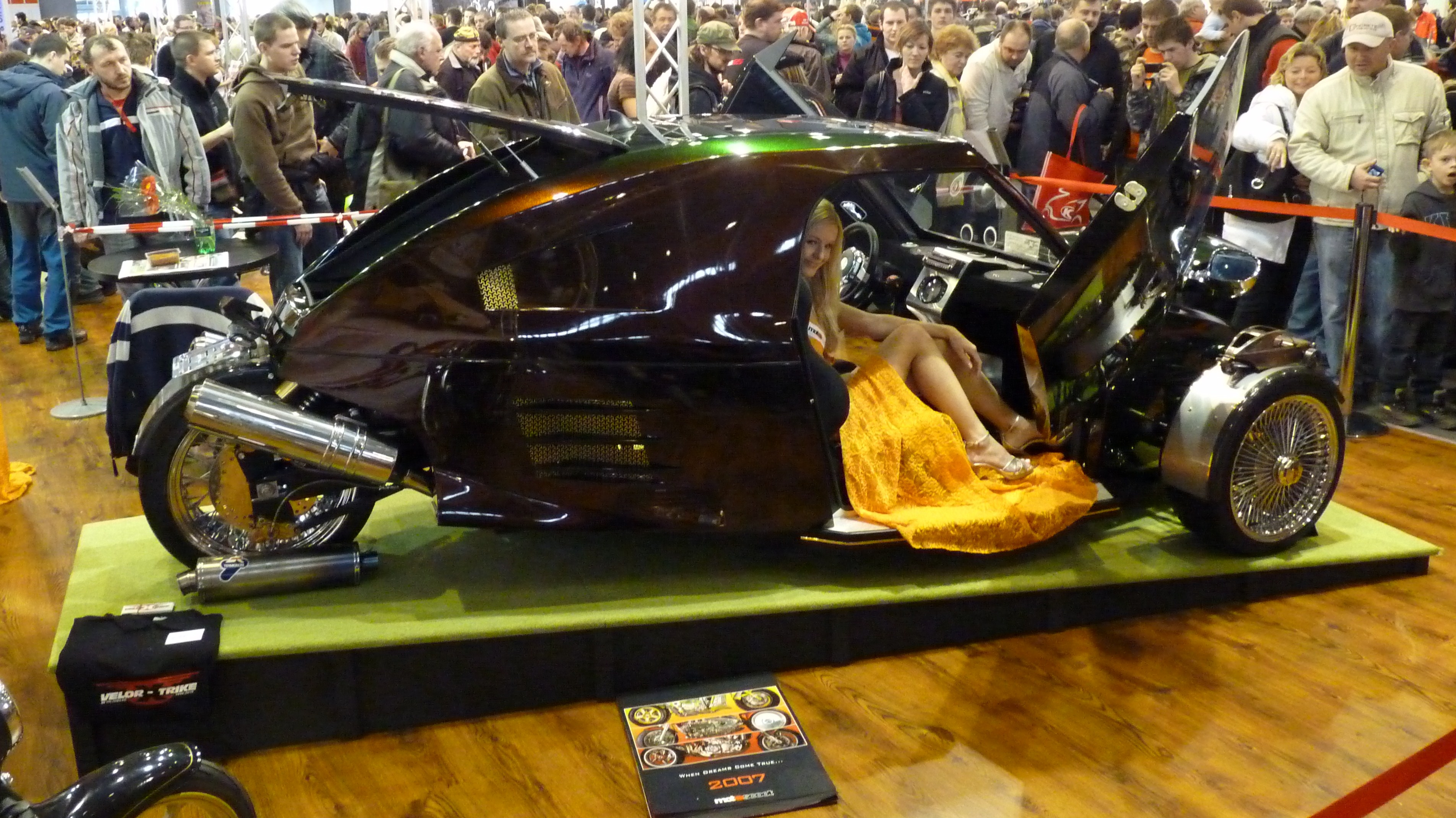 Nový velorex na motosalonu 2010 na brněnském výstavišti